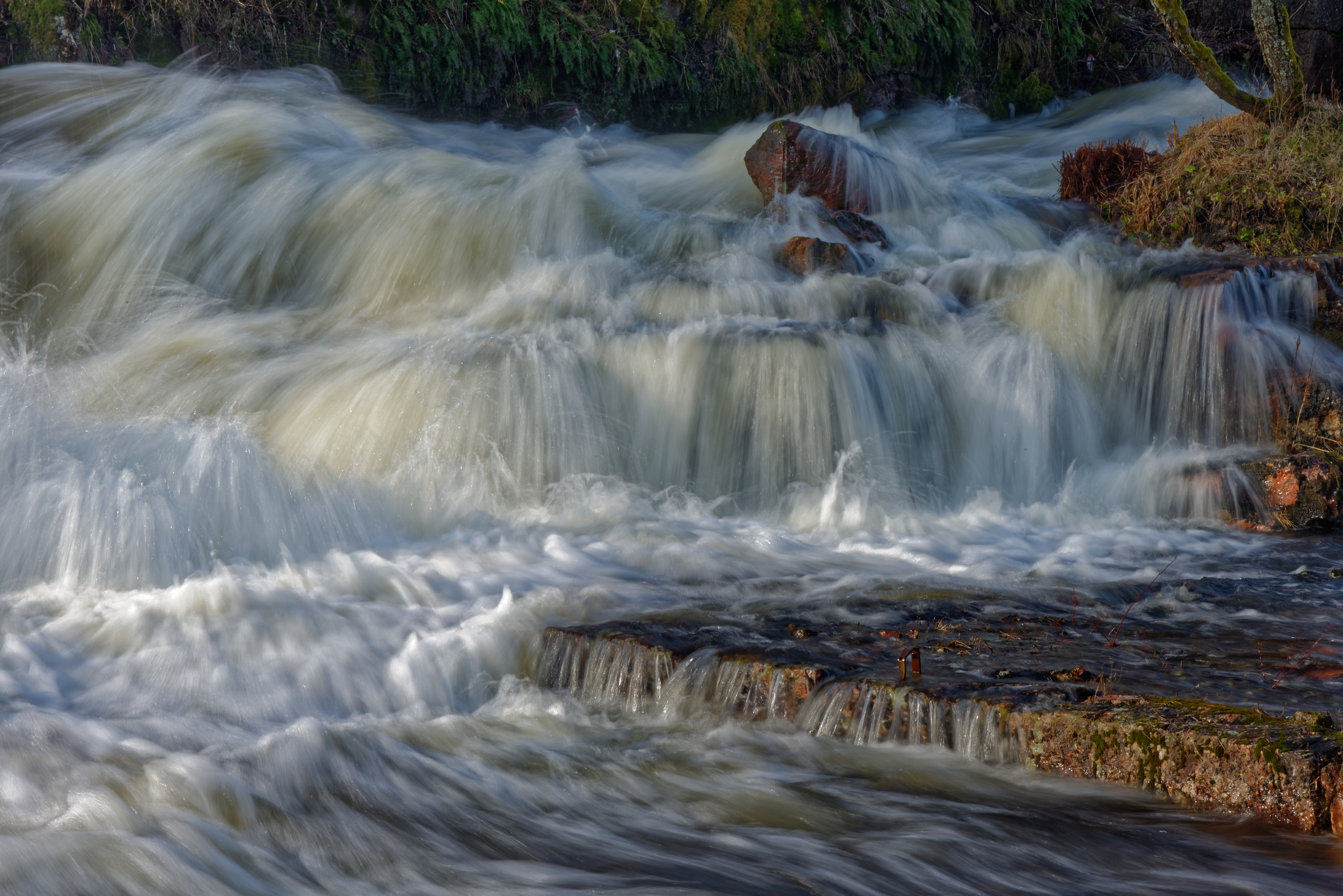 Early spring at Borgvik, Grums Municipality, Värmland, Sweden. The rapids of Borgviksälven running through the old iron works in Borgvik.